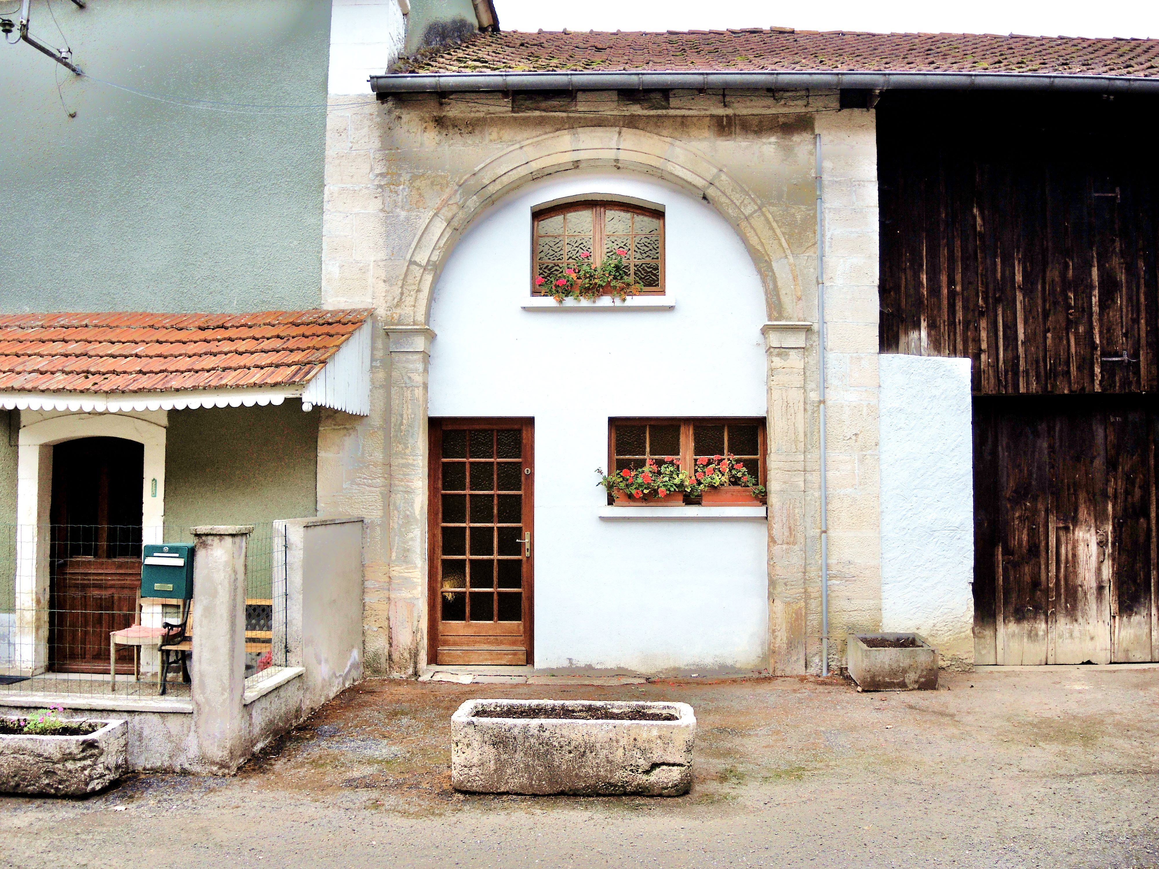 Une des entrées de l'ancienne abbaye de Lieu-Croissant ou des trois rois à Mancenans. Département du Doubs.